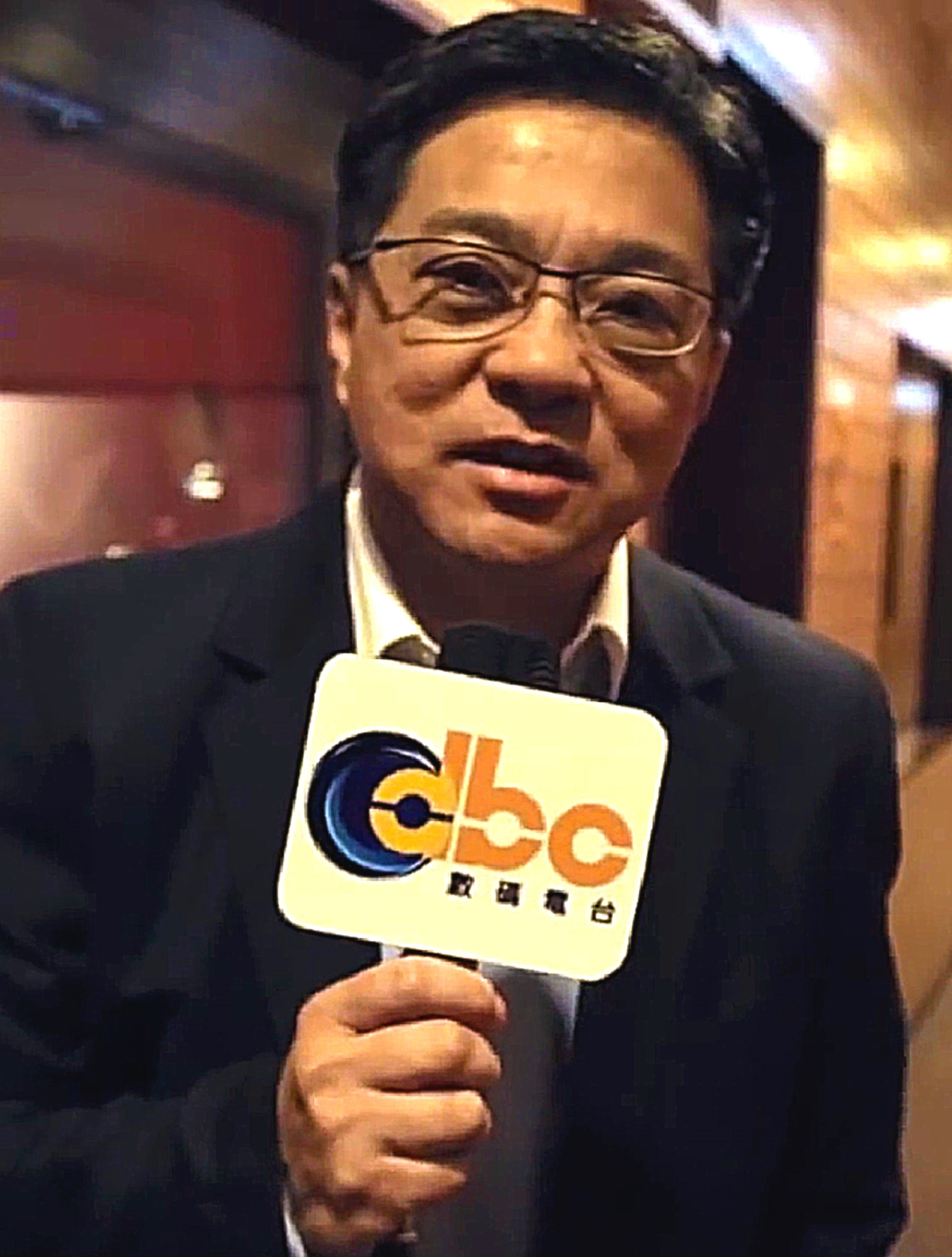 香港廣播主持人麥潤壽，曾於香港電台第二台主持節目《星空奇遇鐵達尼》達13年